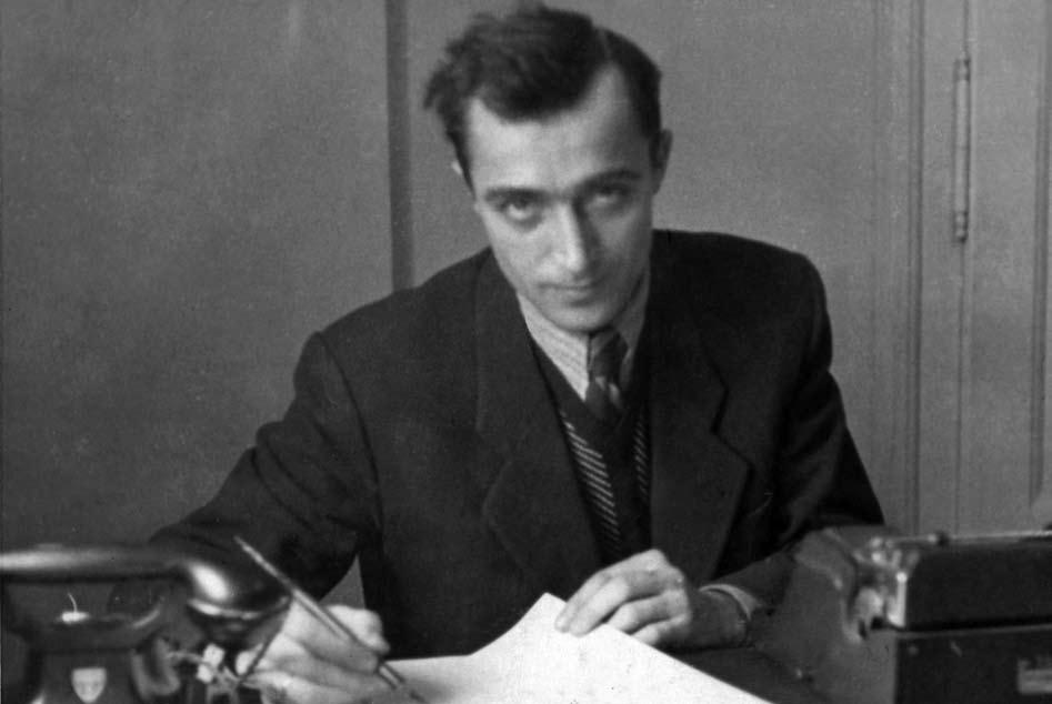 Srpskohrvatski / српскохрватски: Janko Janković (Kragujevac, 26. avgust 1909 — Beograd, 27. april 1944) je bio policijski službenik i saradnik NOP-a koji je nakon okupacije Jugoslavije uspeo da uništi spiskove komunista kako ne bi pali u ruke nacista.